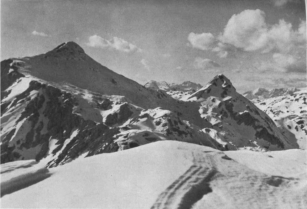 Mahavšček in Bogatin od Kuka.